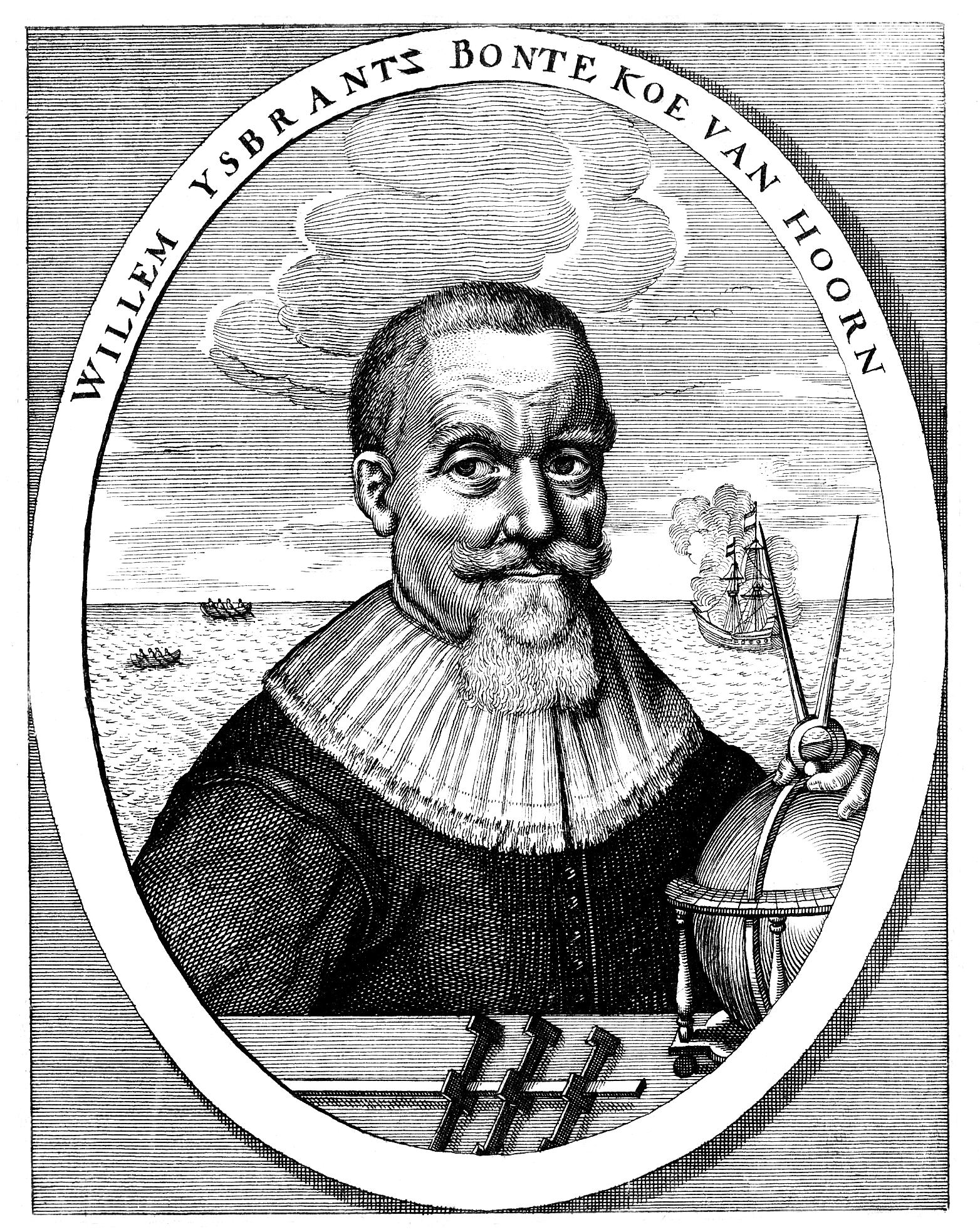 Willem IJsbrantszoon Bontekoe